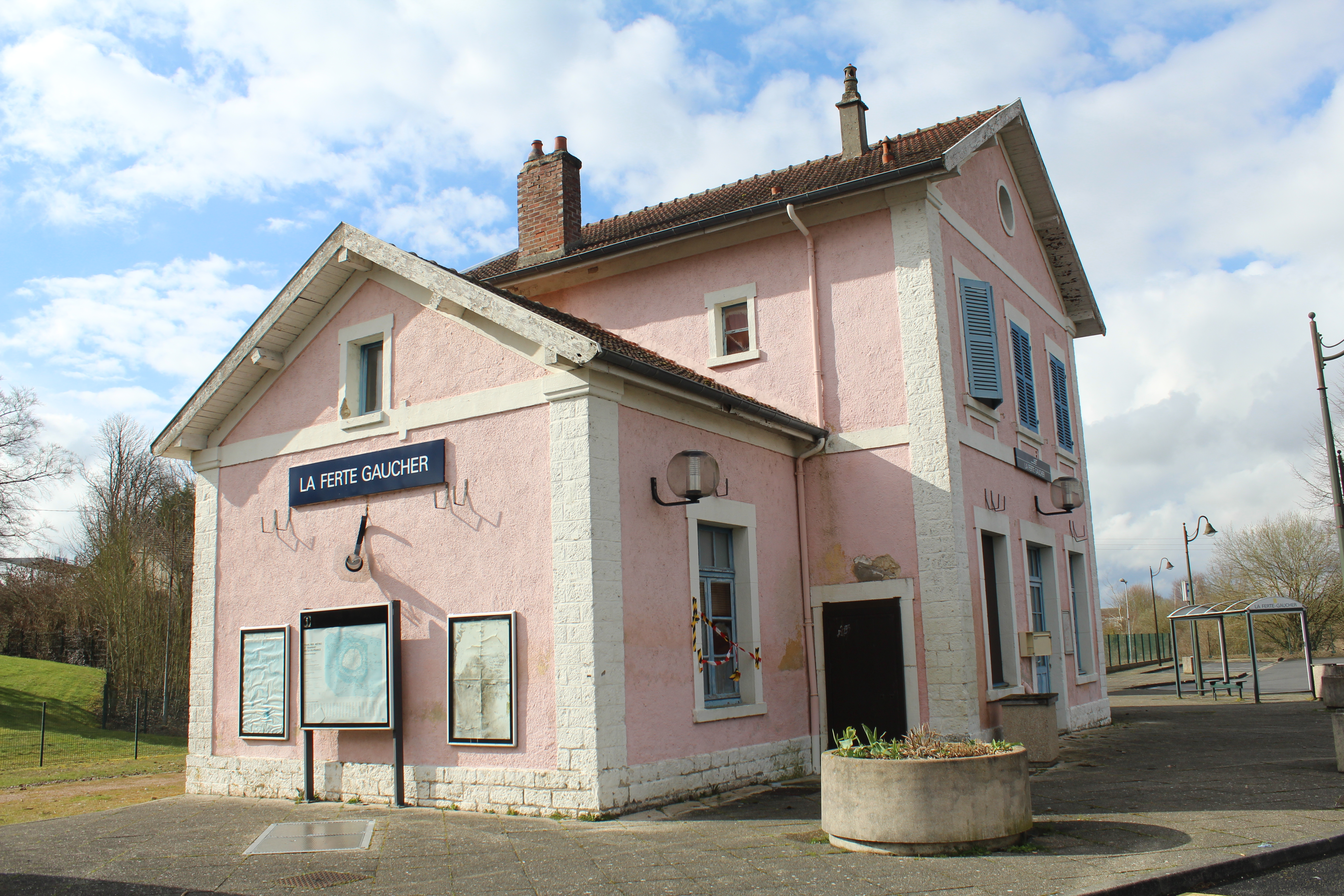 Gare de La Ferté-Gaucher.